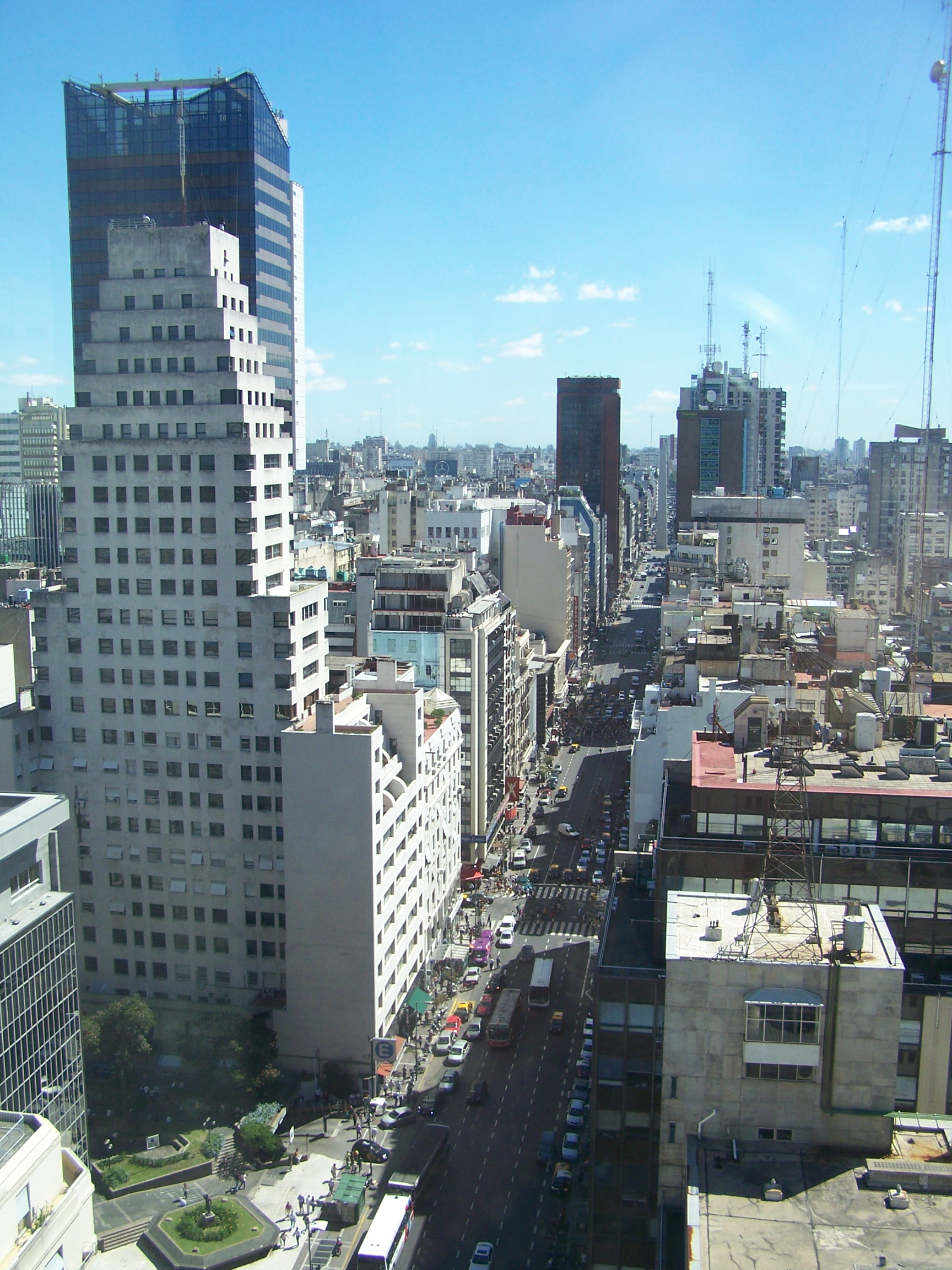 Corrientes Avenue, Buenos Aires.